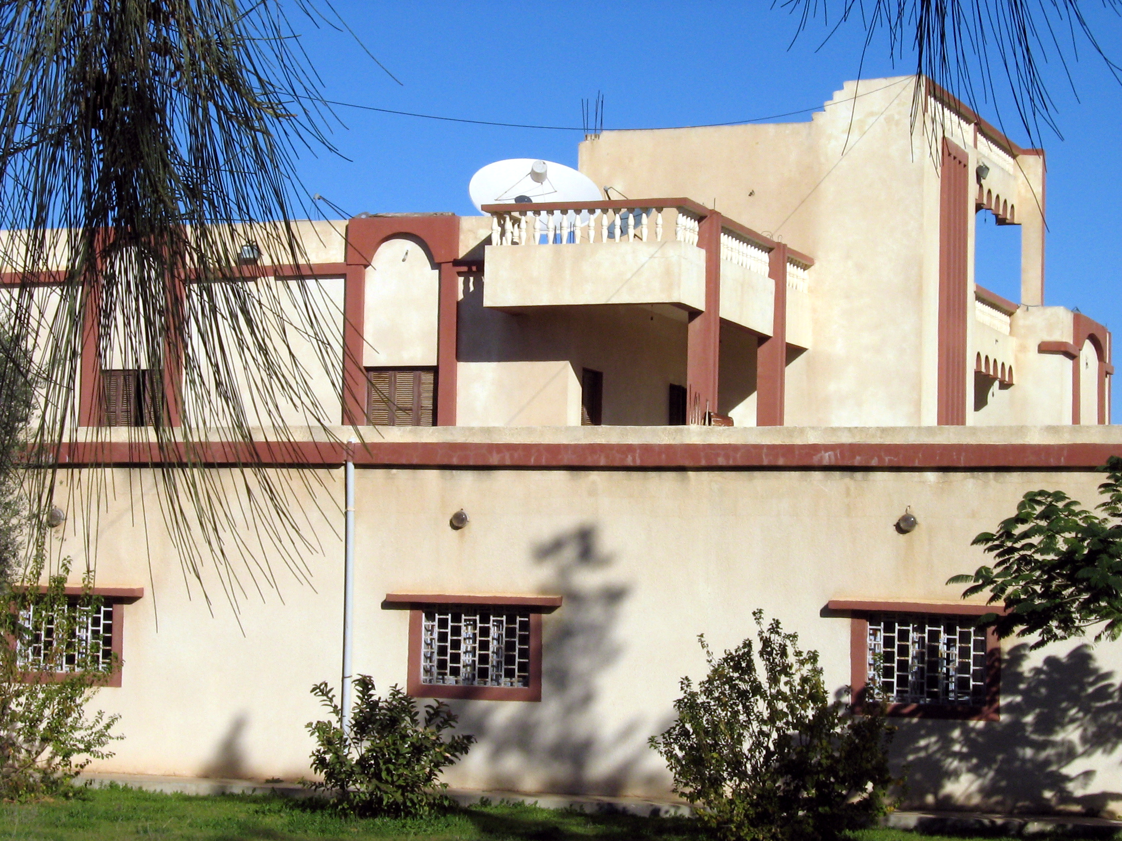 Типичный дом ливийца в Бенгашире.